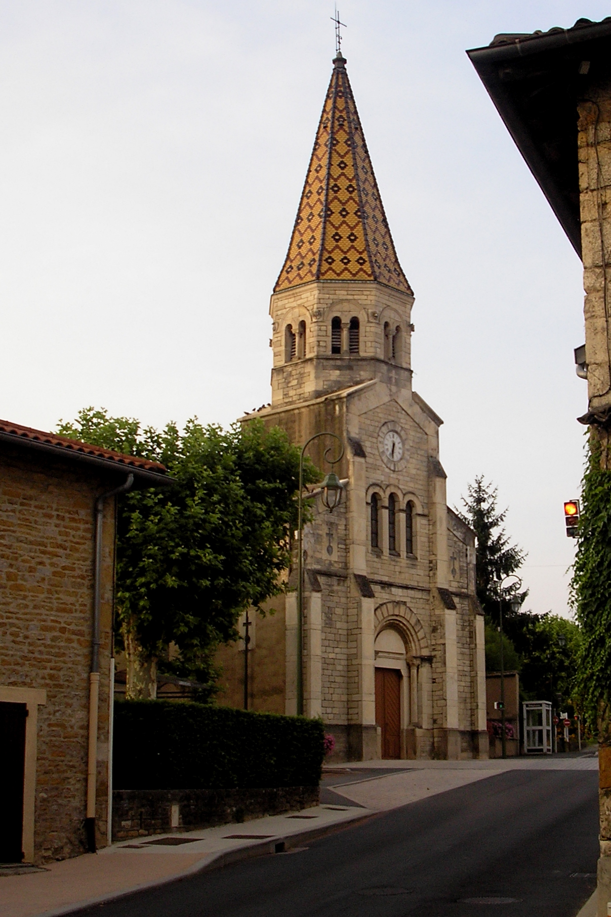 Le clocher de Limas